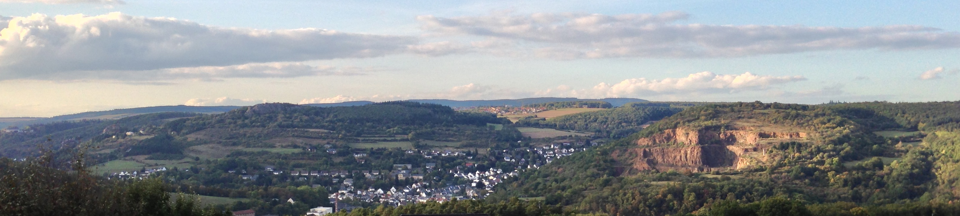 Ein Panorama-Foto von Kirn, vom höchstmöglichen Punkt in Kirn aufgenommen, bei dem die Füsse noch die Erde berühren.